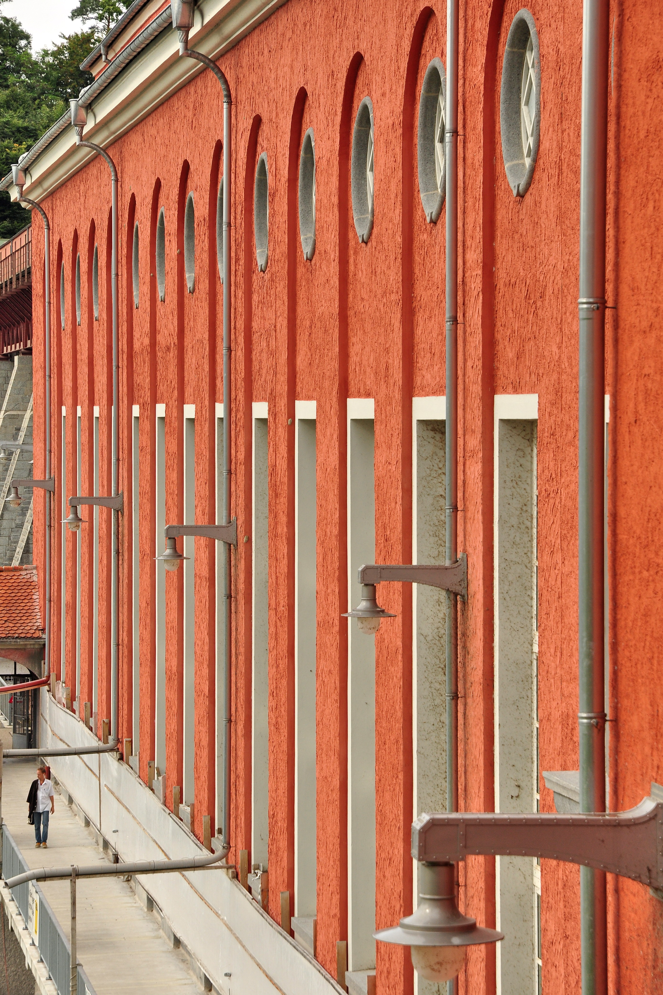 Kraftwerk NOK Eglisau – Rheinsfelden, Zollstrasse in Glattfelden (Switzerland)